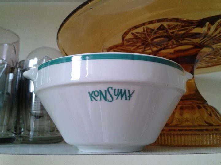 Naczynie konsumpcyjne z logo "Konsumy"